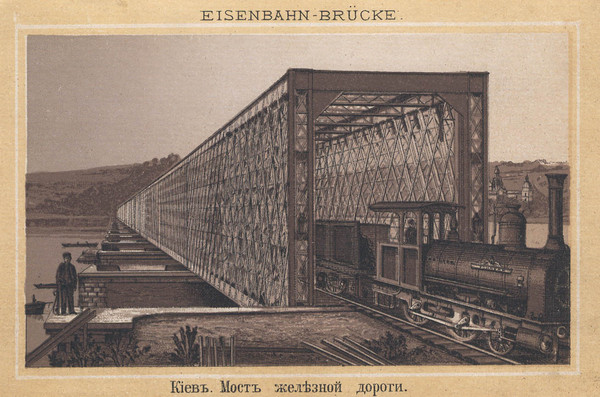 Железнодорожный мост Струве в Киеве. Открытое письмо Росийской Империи.